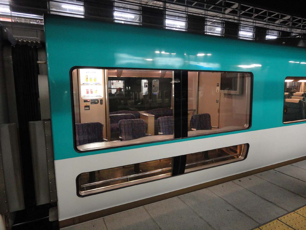 JR西日本283系 展望スペース